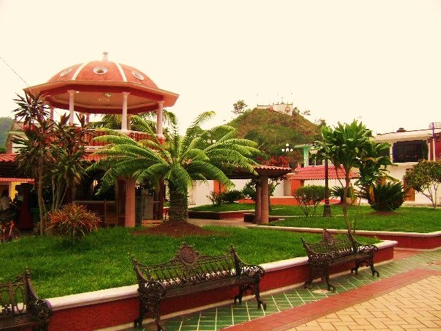 Asi es Colipa.